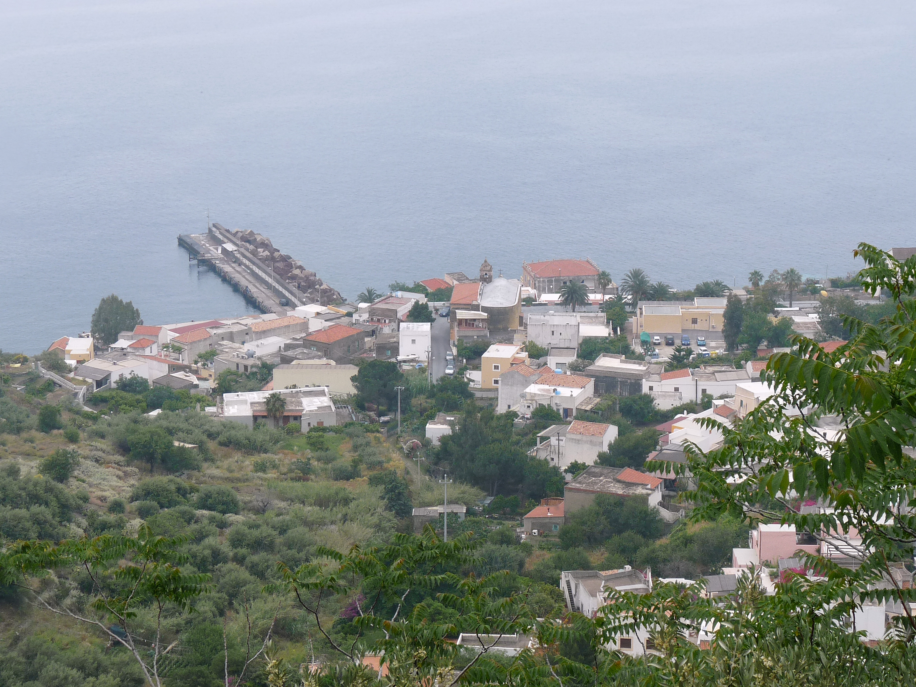 Jetée de Rinella (commune de Leni) sur l'île de Salina (îles Eoliennes, Sicile). On aperçoit l'église San Gaetano.